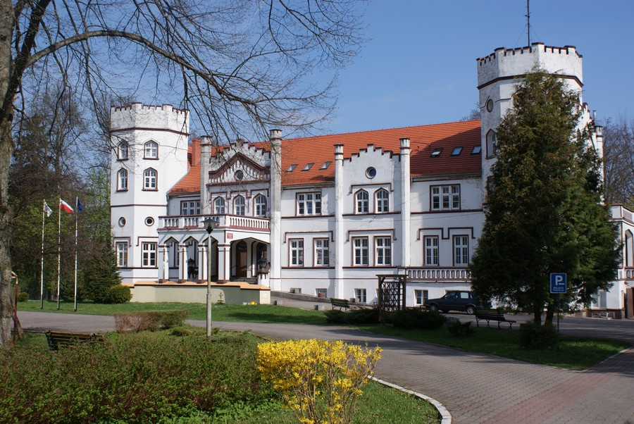 Pałac w Catuniu